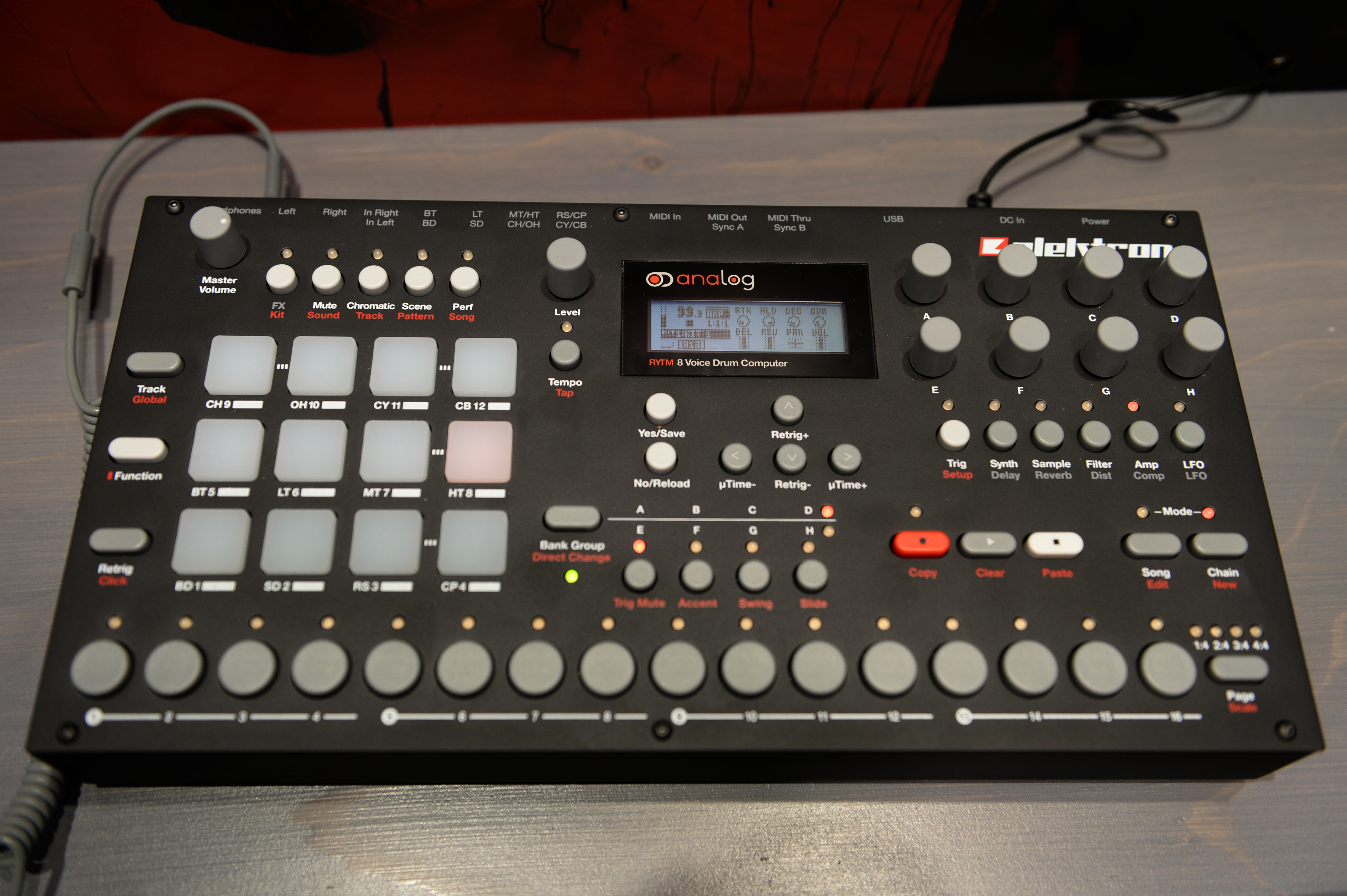 Elektron_AnalogRYTM